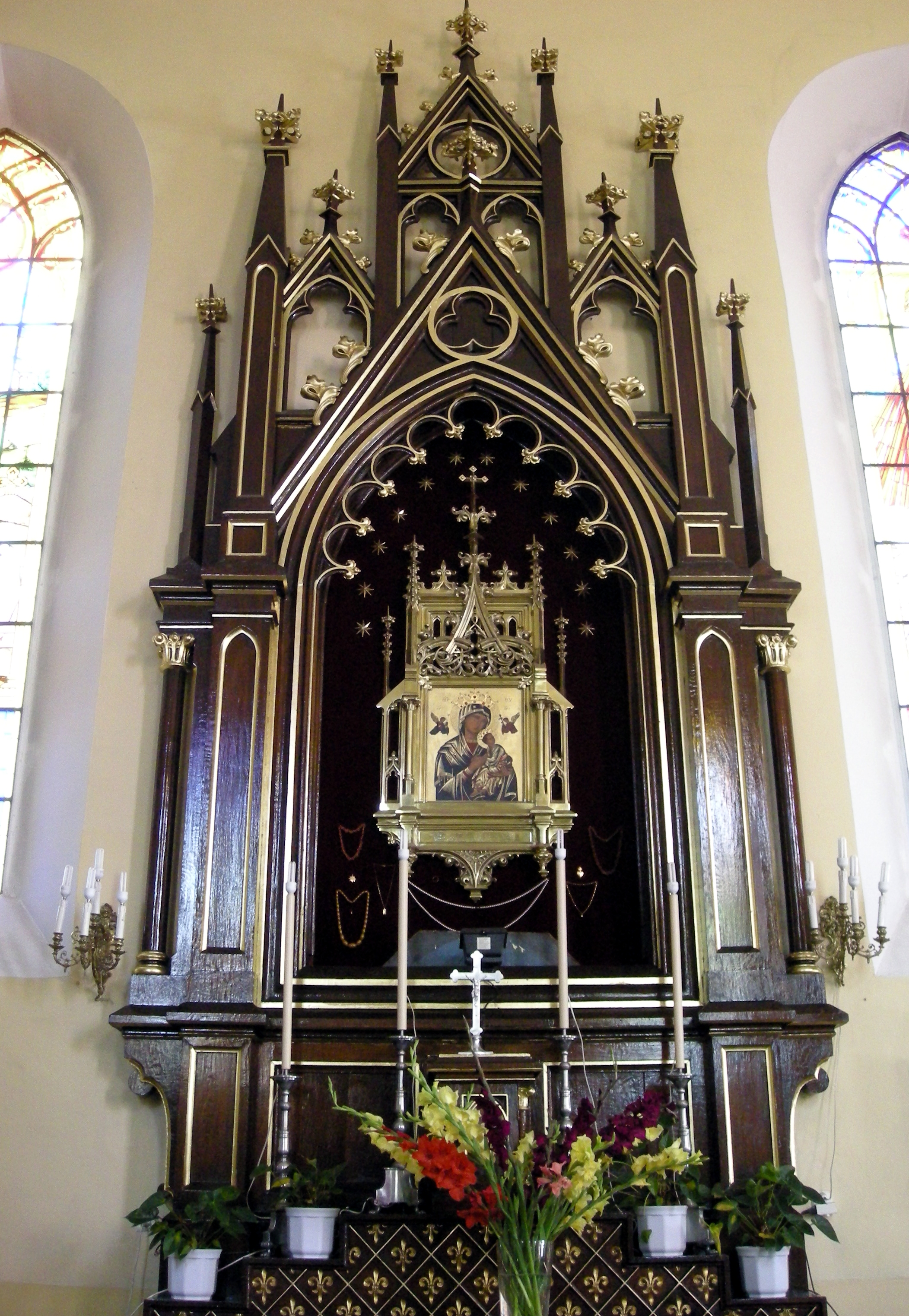 Ołtarz Matki Bożej Nieustającej Pomocy w kościele parafialnym w Huszlewie.